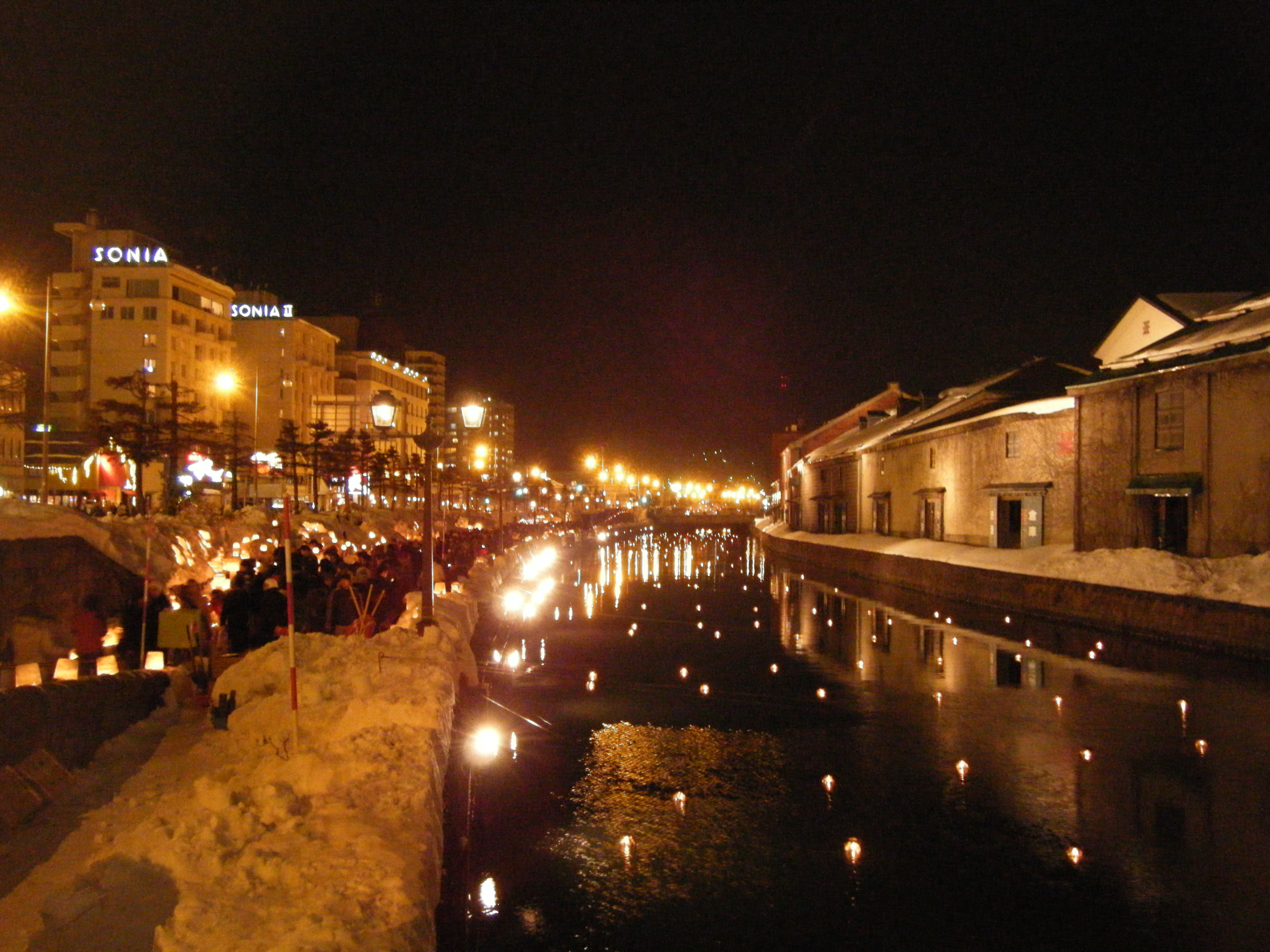 小樽雪あかりの路開催中の小樽運河